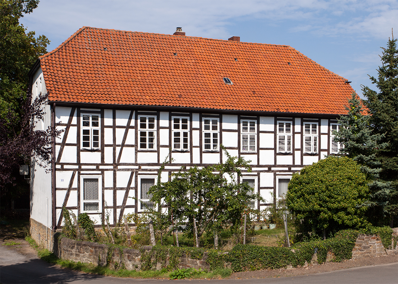 Ehemaliges Lippisches Zollhaus (später Schule) in Erder (Kalletal) This is a photograph of an architectural monument.